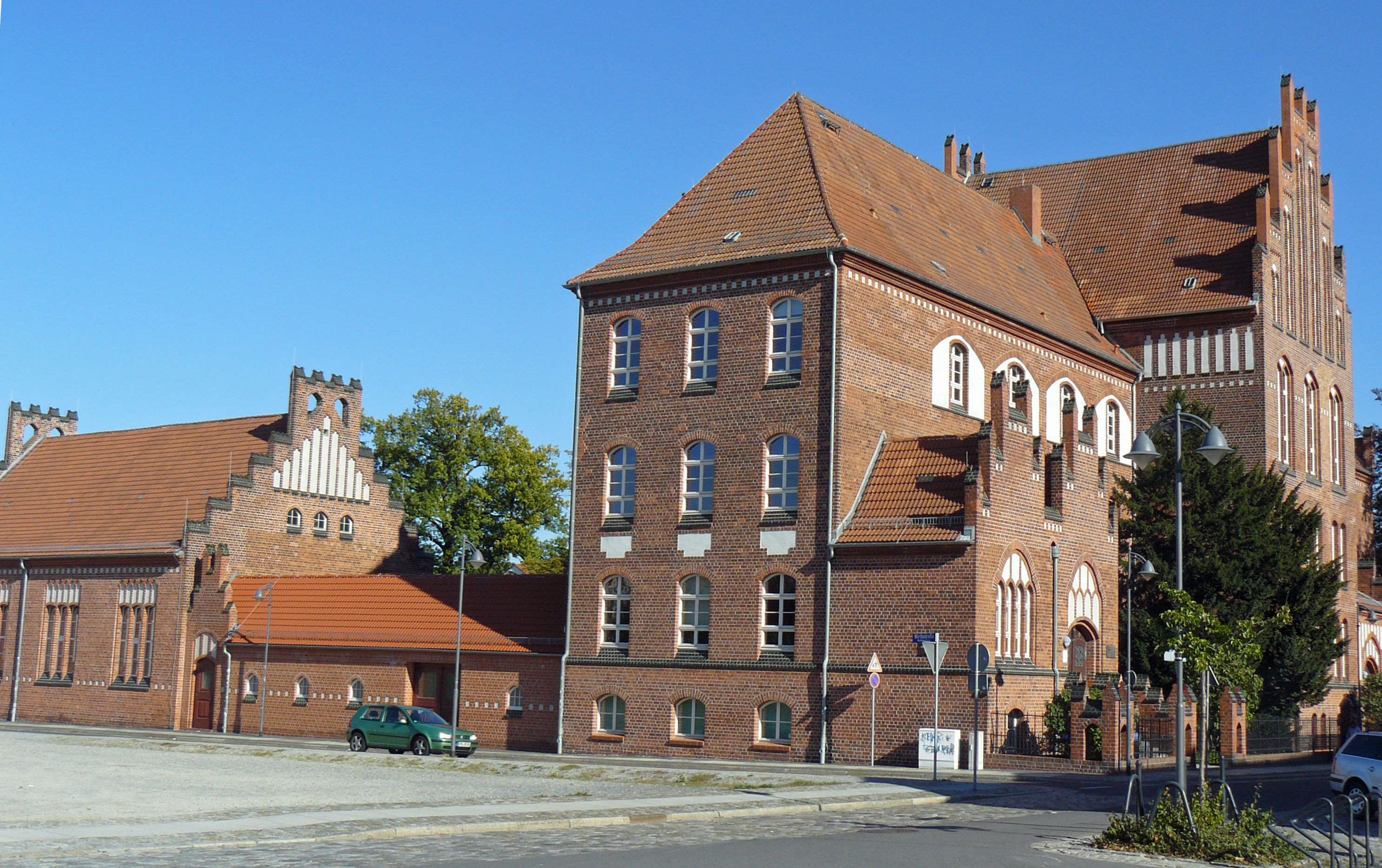 Berufsorientierenden Oberschule in Spremberg/ Niederlausitz